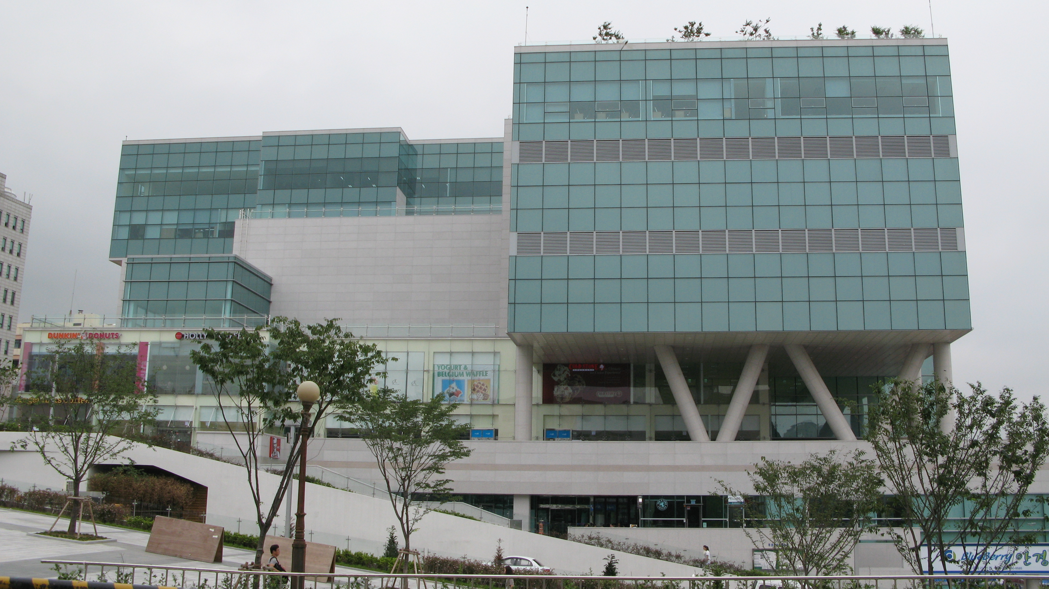 부산대학교 장전캠퍼스 내에 있는 효원문화회관